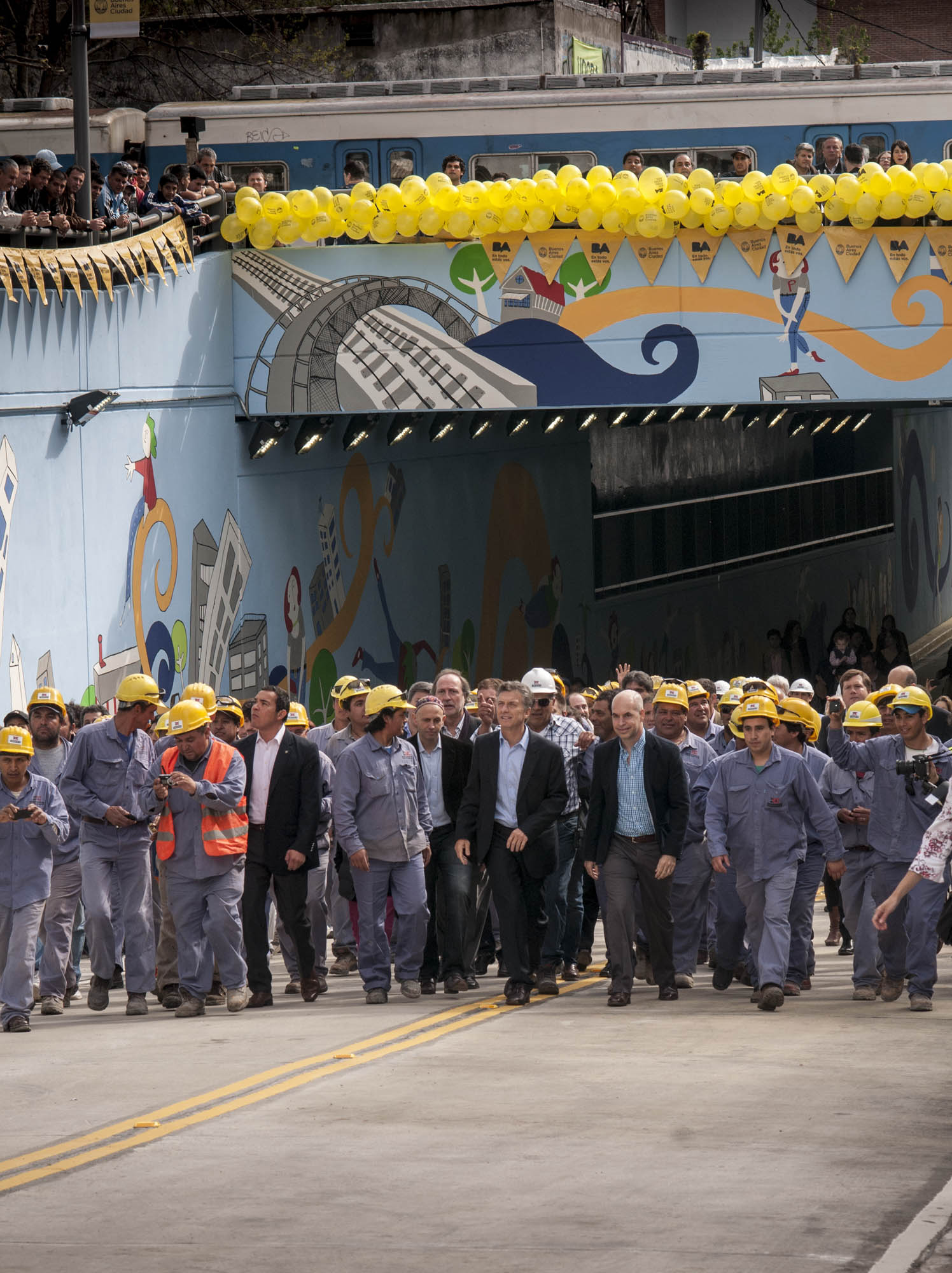 Buenos Aires, 10 de octubre 2013: El jefe de Gobierno de la Ciudad de Buenos Aires, Mauricio Macri, inauguró esta mañana, el paso bajo nivel ubicado en el cruce de la calle Federico Lacroze con las vías del Ferrocarril Mitre Foto: Sandra Hernández-sh/GCBA y Tony Valdez/GCBA